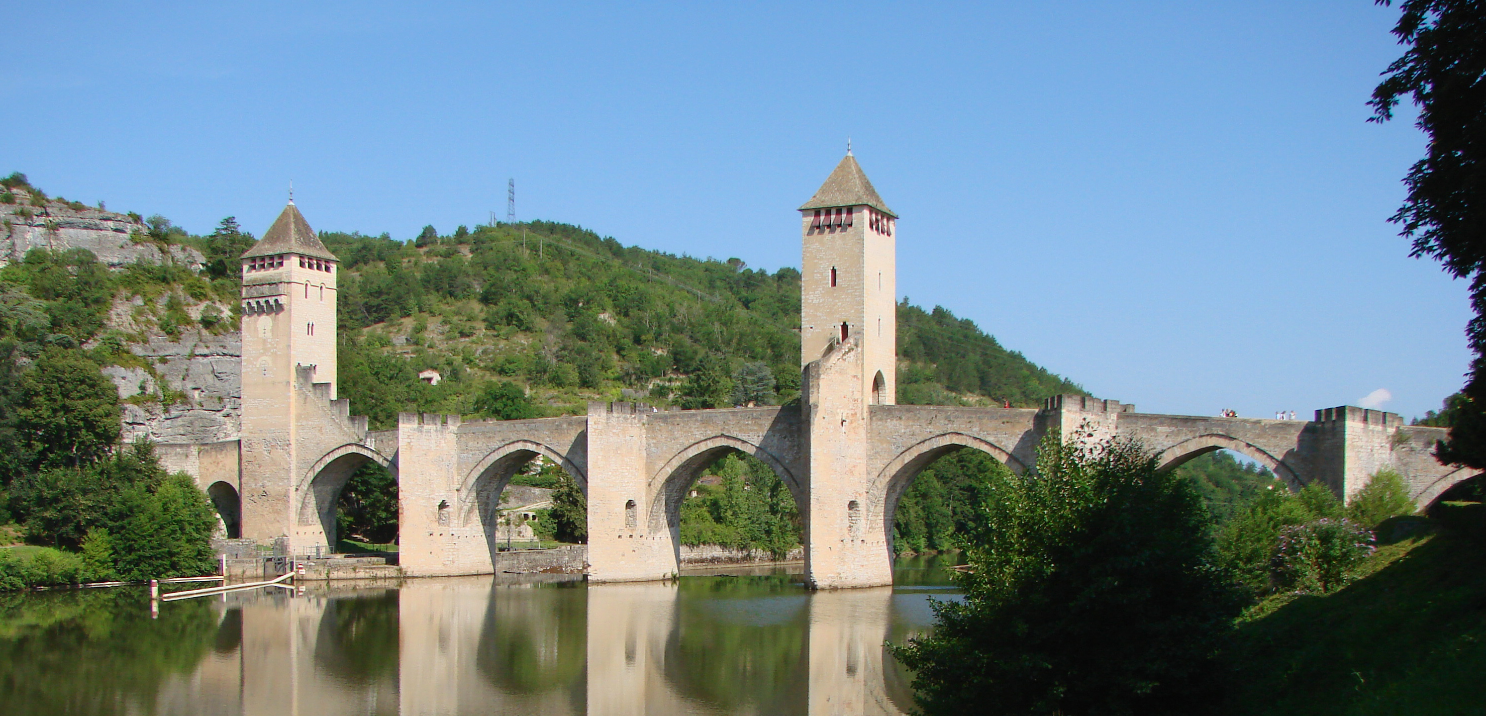 Le Pont Valentré à Cahors,pont fortifié sur le Lot, XIVème siècle.